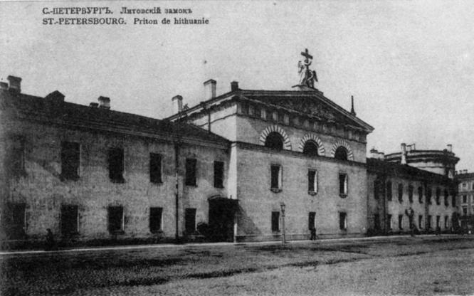 Литовский замок со стороны Офицерской улицы